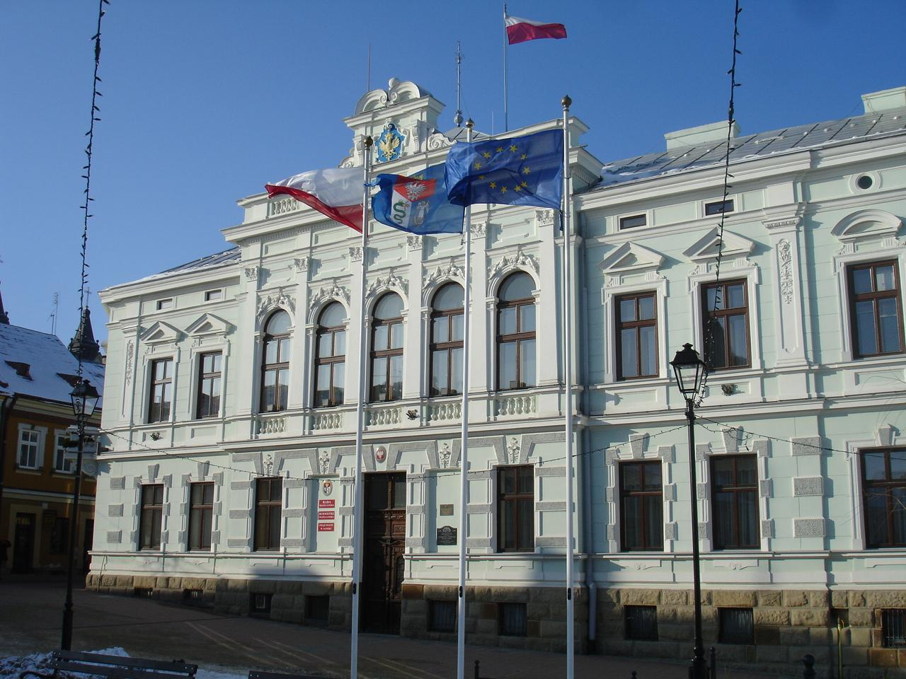 Magistrat w Sanoku. Market Square in Sanok.